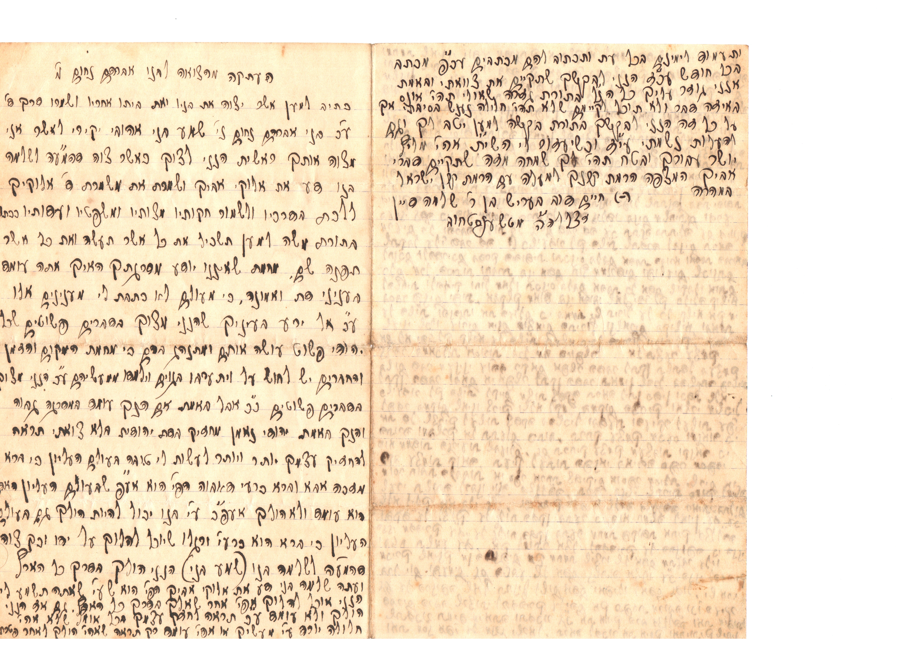 הצוואה הסודית שכתב הרב חיים דוב שטנצל לבנו הסופר אברהם נחום שטנצל שהתרחק מהדת.